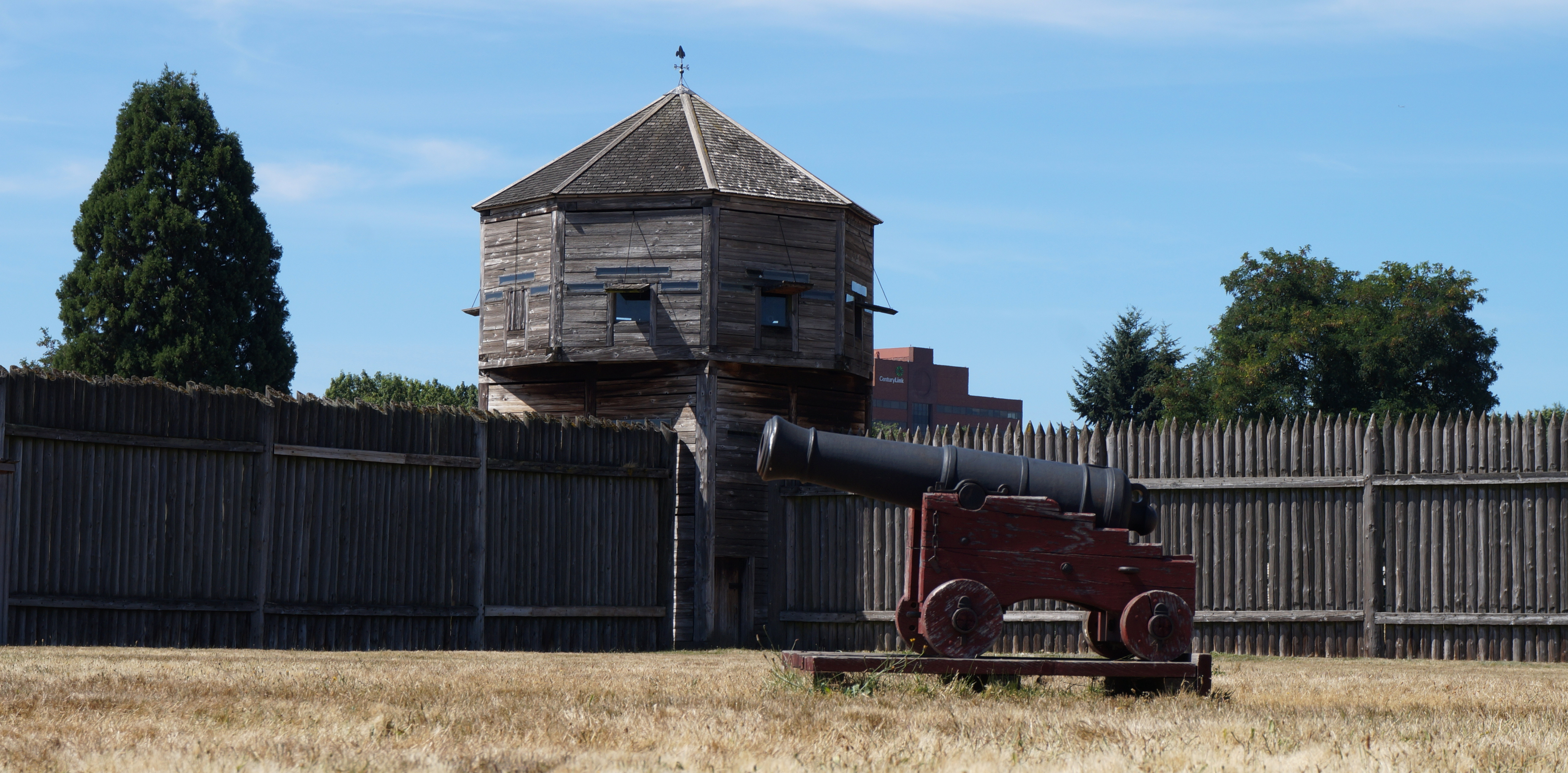 DSC00868a